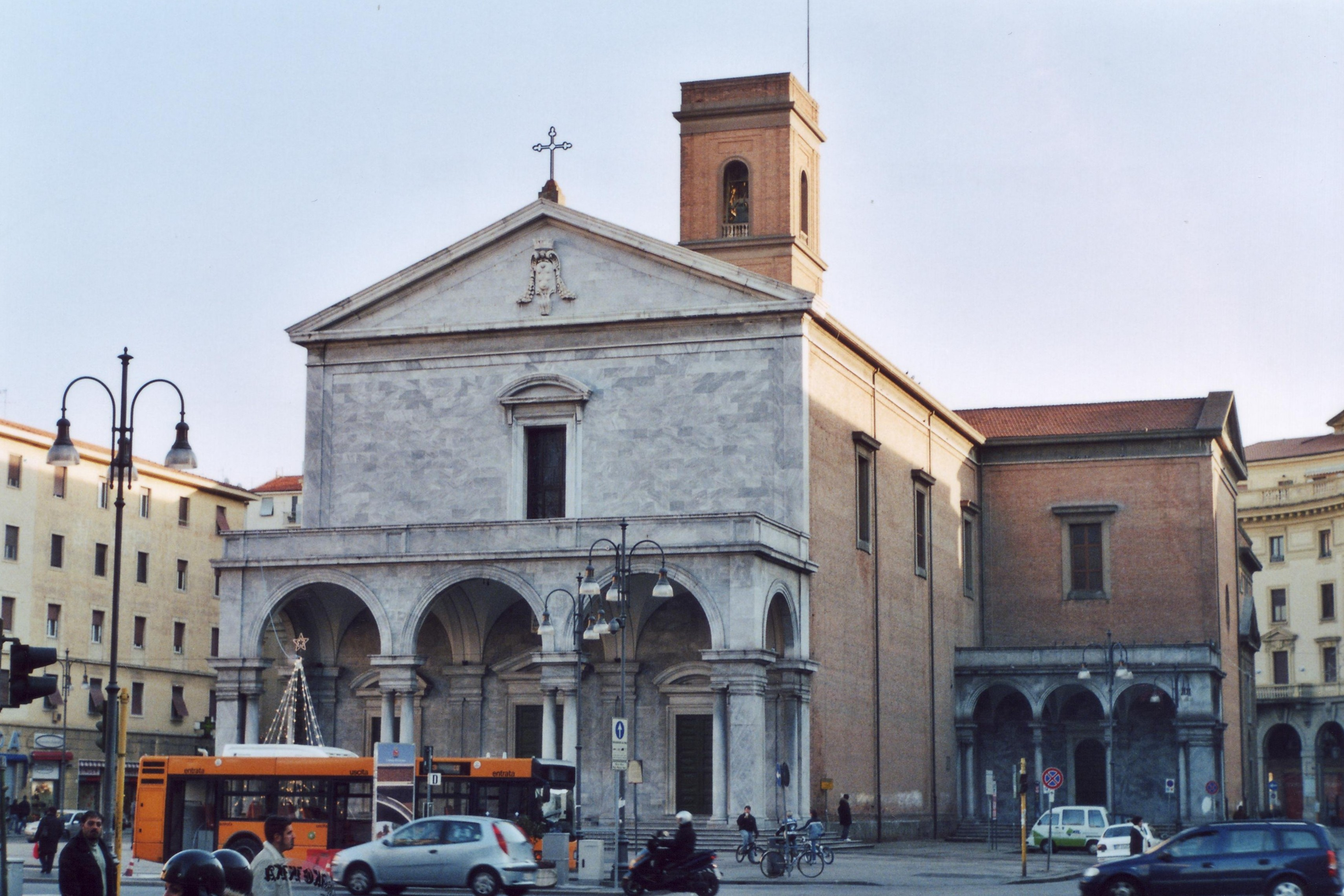 Livorno: il Duomo di Livorno, iniziato sul finire del Cinquecento e ricostruito quasi integralmente dopo la seconda guerra mondiale. Photo January 2006